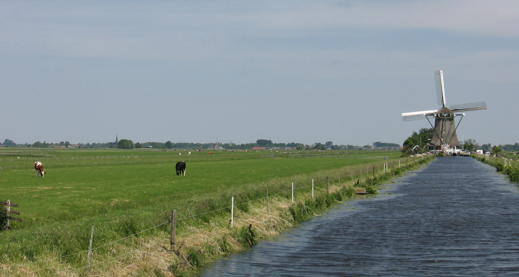 Landschap molenviergang Aarlanderveen, molen no 3 op voorgrond